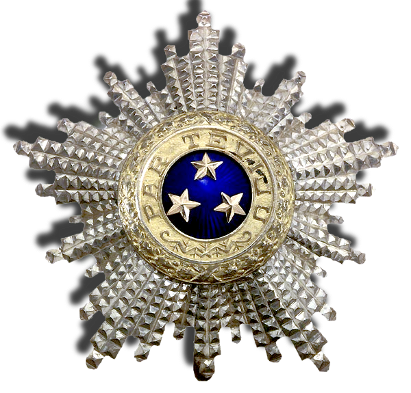 Latvian Kolmen Tähden ritarikunnan rintatähti.